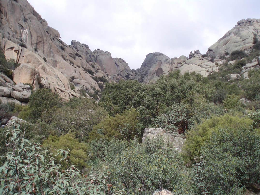 Hueco de las Hoces y El Yelmo de La Pedriza (Comunidad de Madrid, España).